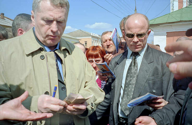 Владимир Вольфович Жириновский 4 мая 2004 года посетил город Переславль по дороге из Москвы в Рыбинск. Он остановился около Семёновской церкви, делал автографы на агитационных книгах и брошюрах, раздавал переславцам деньги по 200 рублей в ладонь. Переславль-Залесский, Ростовская улица, между 14 и 16 домами.